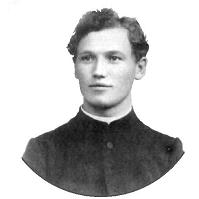 Image scannée à partir d'une photographie personnel. Image retouchée (original déteriorée).